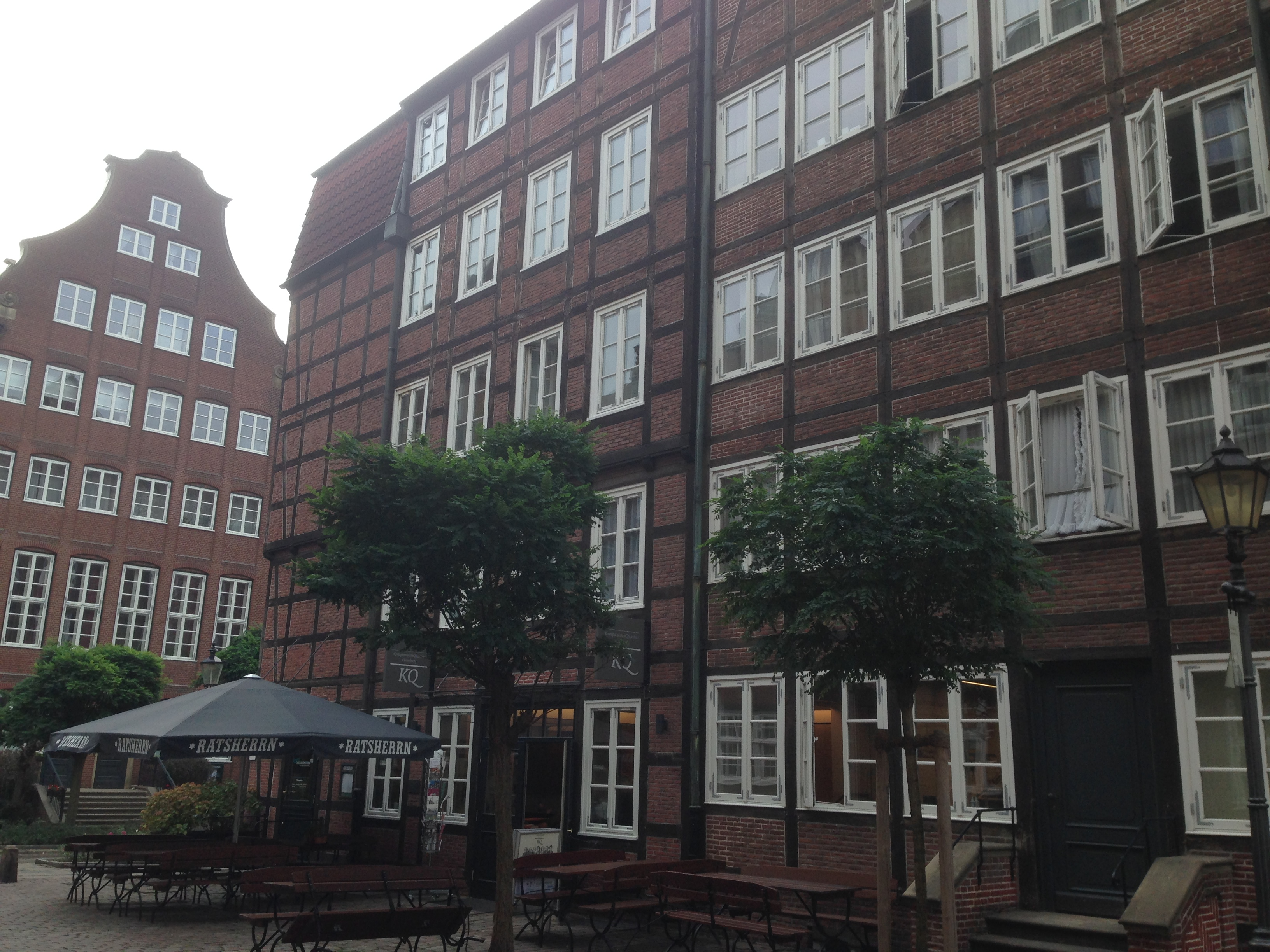 Peterstraße 29 Hamburg, KomponistenQuartier Hamburg